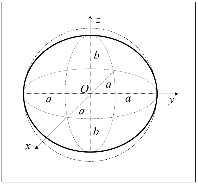 Esfera Oz norabidean pixka bat zapalduz sorturiko esferoidea, Lurraren antzeko forma erakutsiz.